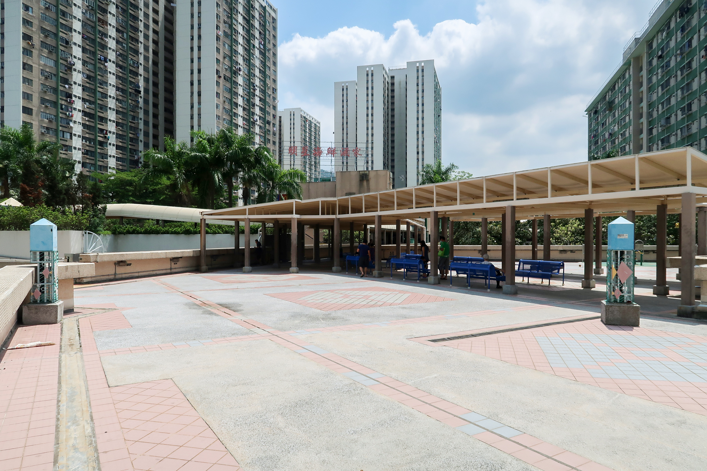 Shek Wai Kok Estate